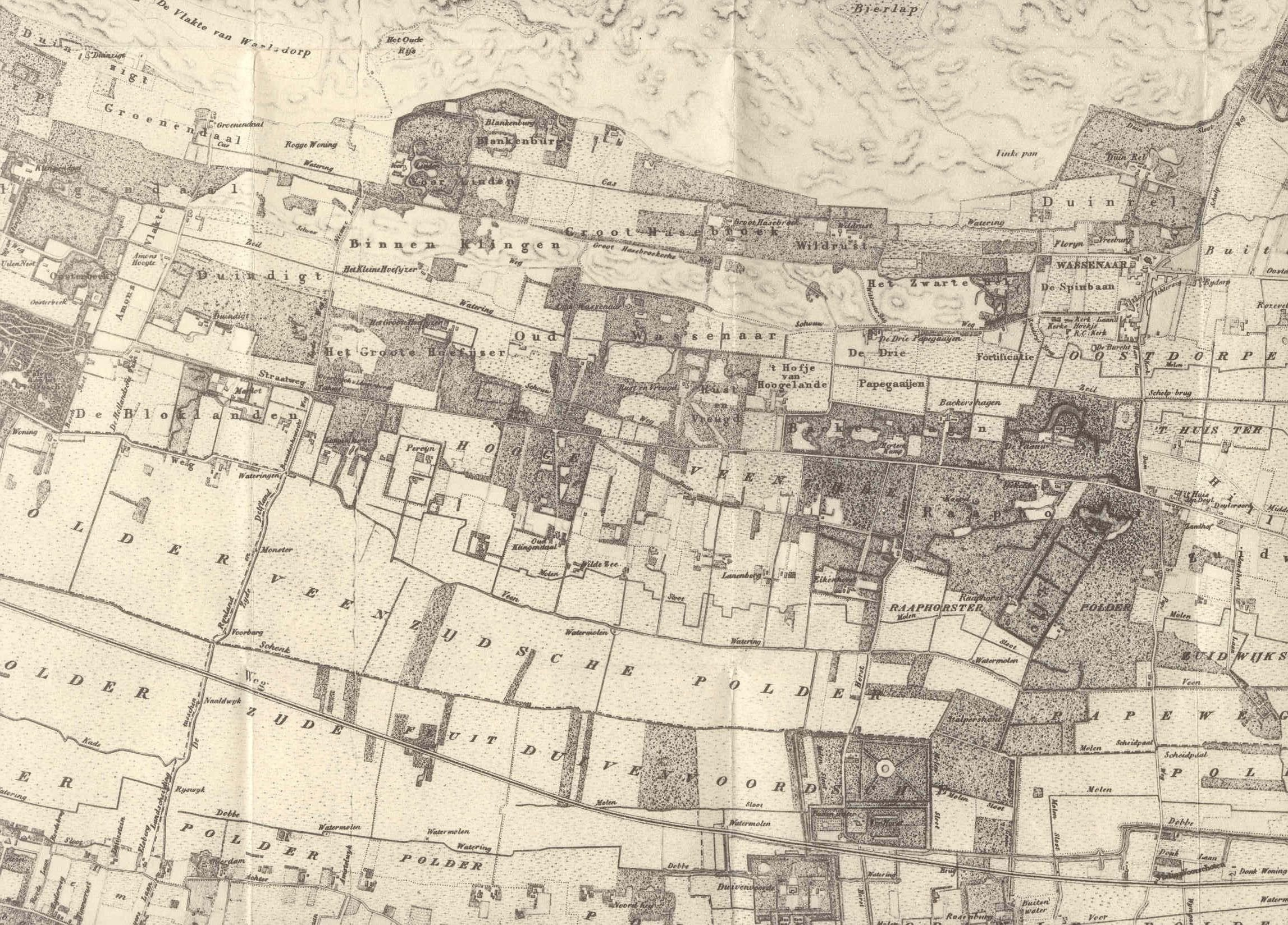 Kaart van de landgoederen bij Wassenaar